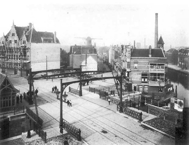 Schiedamseweg (Rotterdam) rond nl:1910. Havenstraat, de Aelbrechtsbrug over de Aebrechtskolk. Linksachter de Schiedamseweg, rechtsachter de Mathenesserdijk met molen de Graankorrel op de achtergrond. Vervaardiger: Fototechnische Dienst Rotterdam ( Gemeentewerken, Openbare Werken ) / fotograaf; Datering: t/m 02/11/1911 Techniek: foto('s) / Afmeting: hoogte 18 cm / breedte 24 cm / Auteursrechthouder: Gemeentearchief Rotterdam /